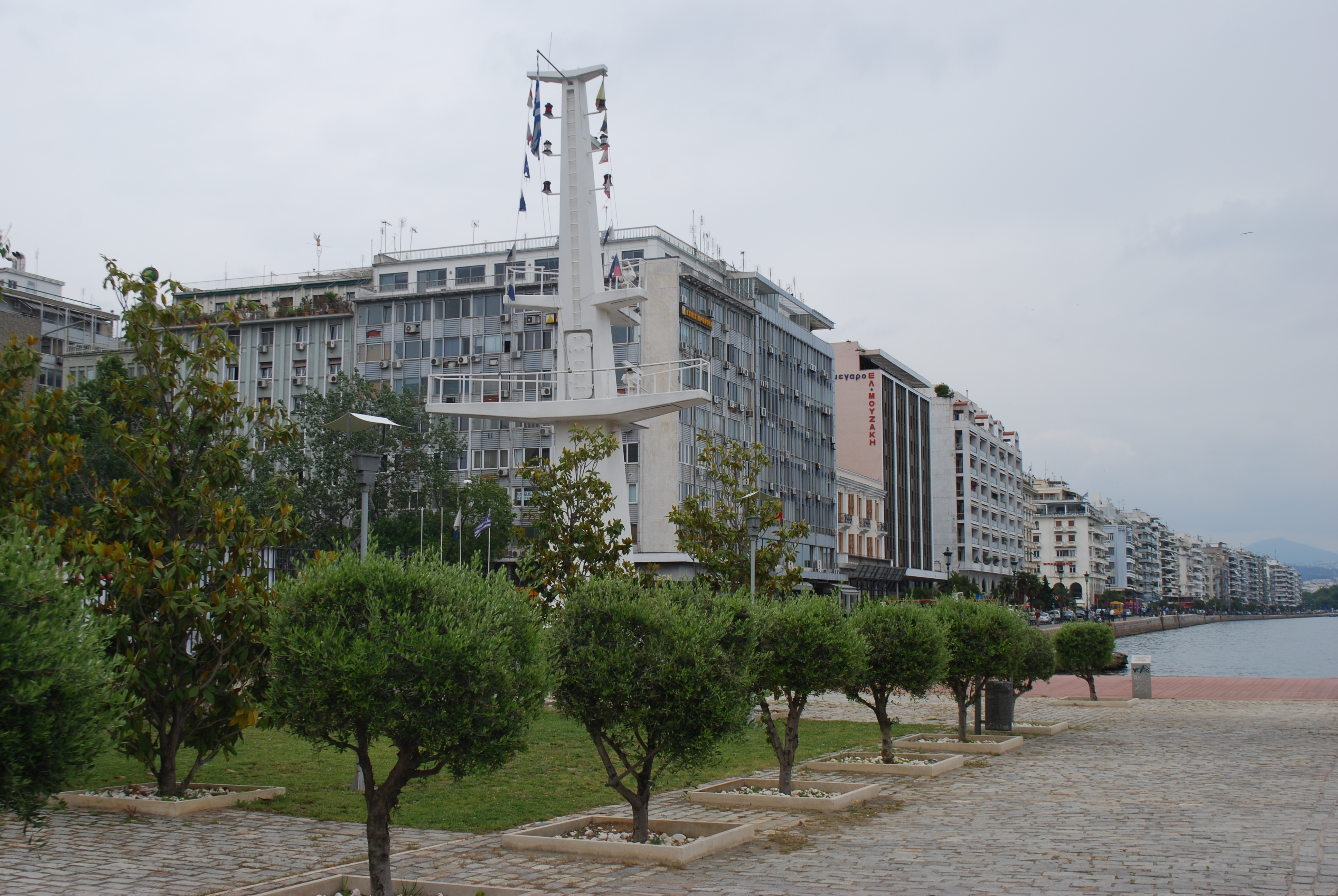 Vue de Thessalonique.